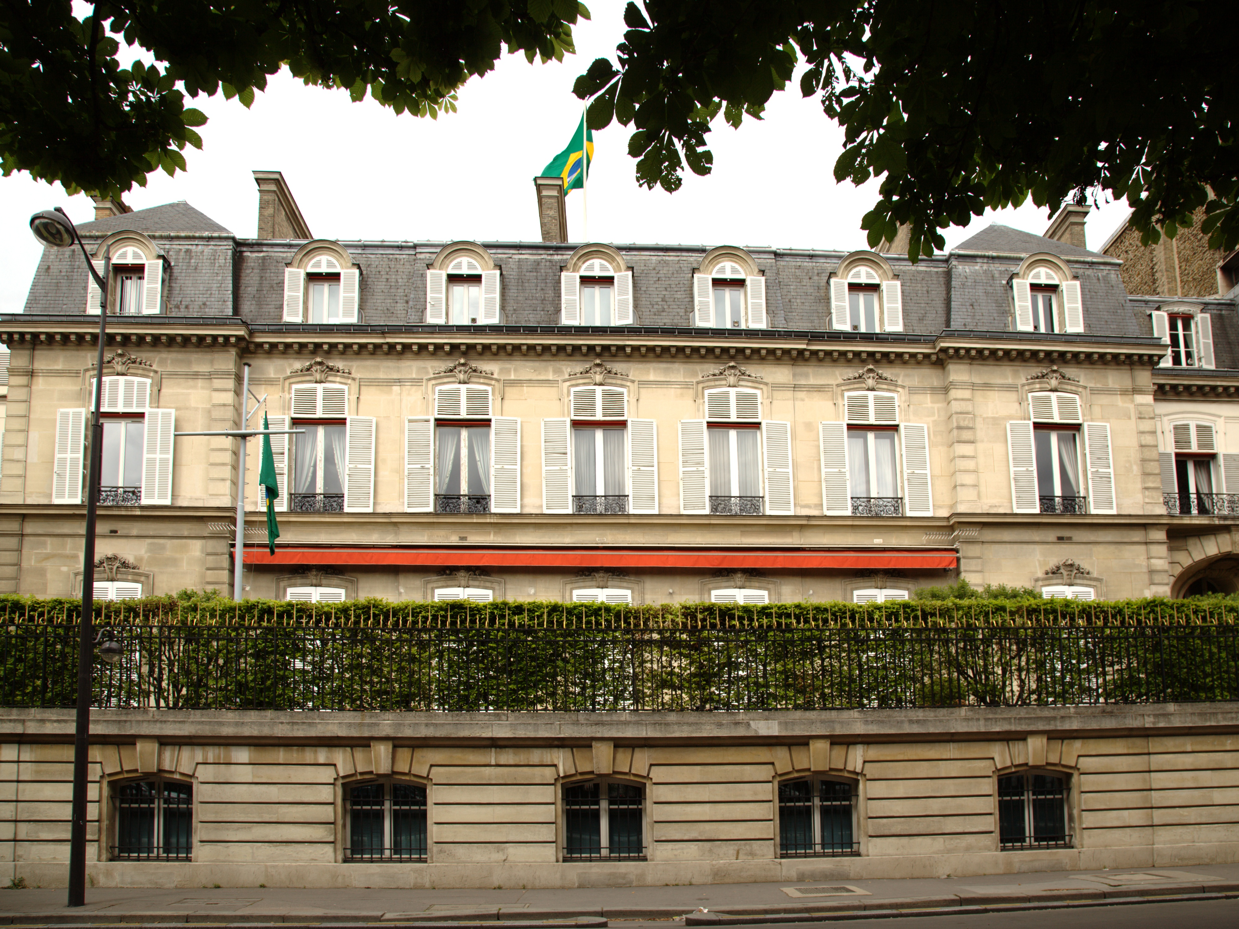 Les numéros 34 et 34bis du cours Albert-1er à Paris, aujourd'hui ambassade du Brésil